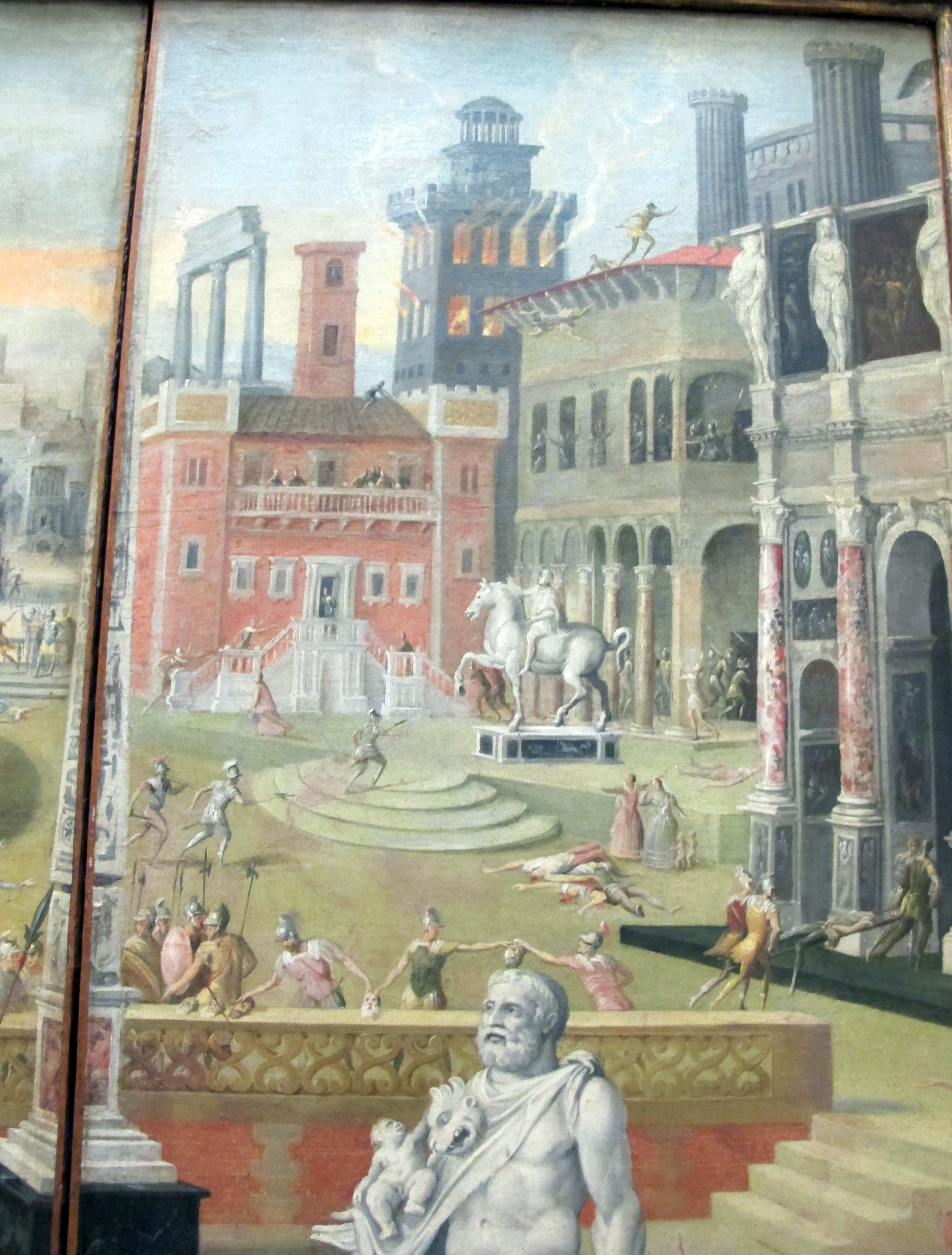 Pittura francese del XVI secolo, Louvre, Parigi